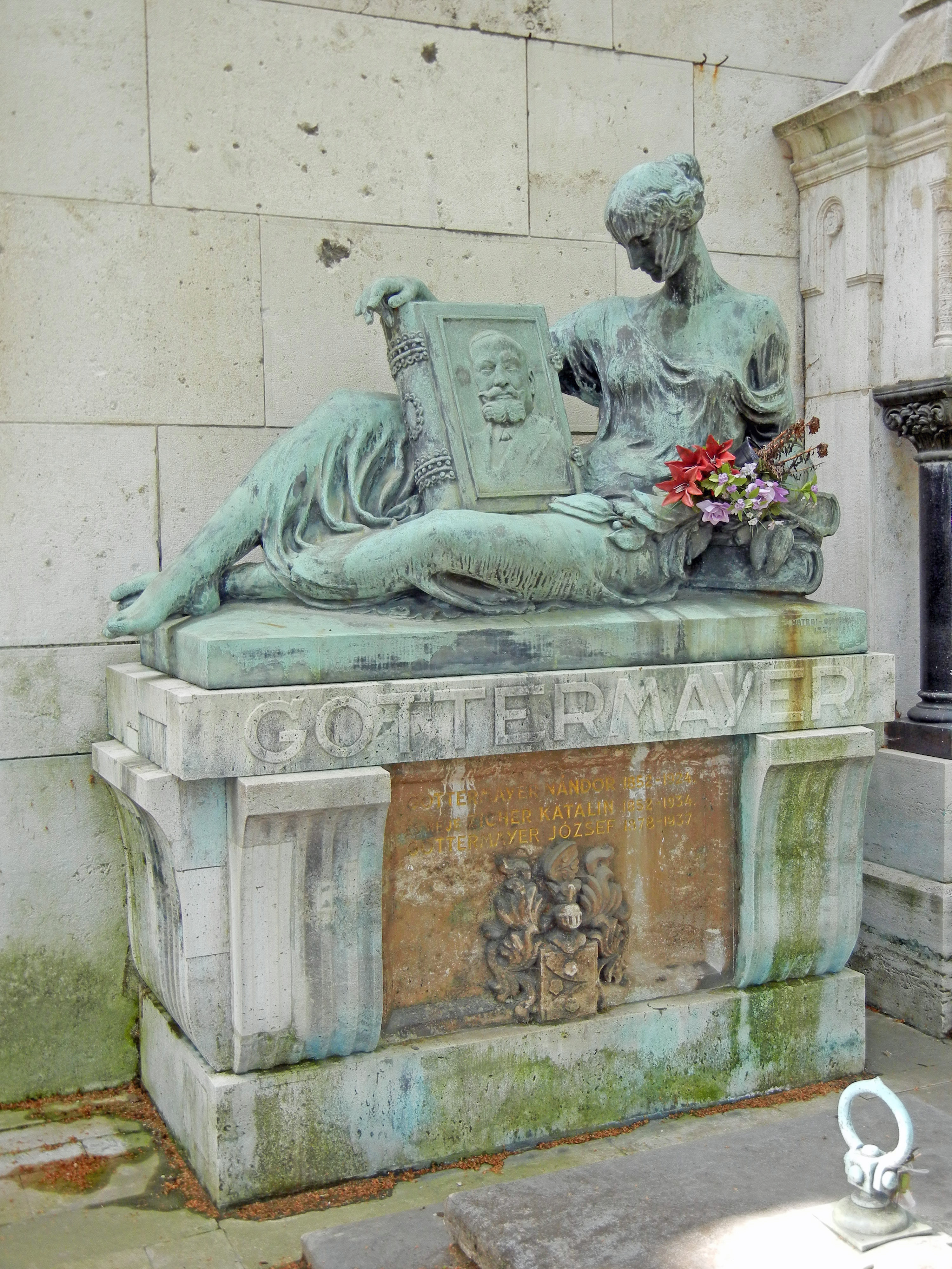 Budapest, Cimetière national de Fiumei út (Fiumei úti Nemzeti Sírkert) ou cimetière Kerepesi (Kerepesi temető) est le plus célèbre cimetière de Budapest